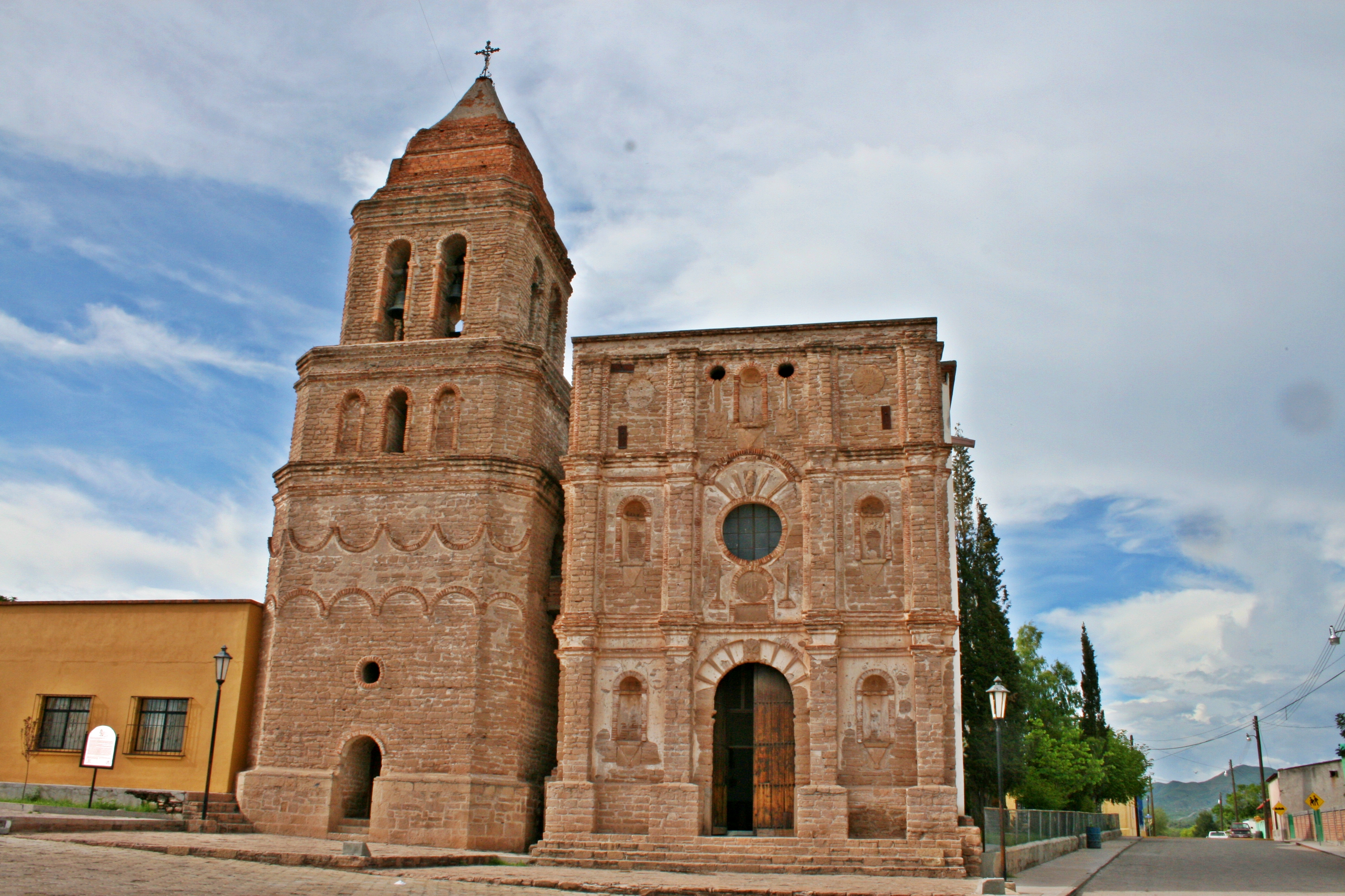 Iglesia construida cerca del año de 1756 en la capital provincial de Arizpe, Sonora.